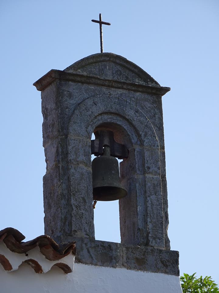 Levantada en su configuración actual por iniciativa de Oliveros de Romelet e Isabel de Bolineau el año 1654 (siglo XVII). Edificación religiosa que contiene otras imágenes, grabados, cuadros y púlpito de interés, y que, además, forma parte de una ruta histórica de promoción municipal en Tacoronte.